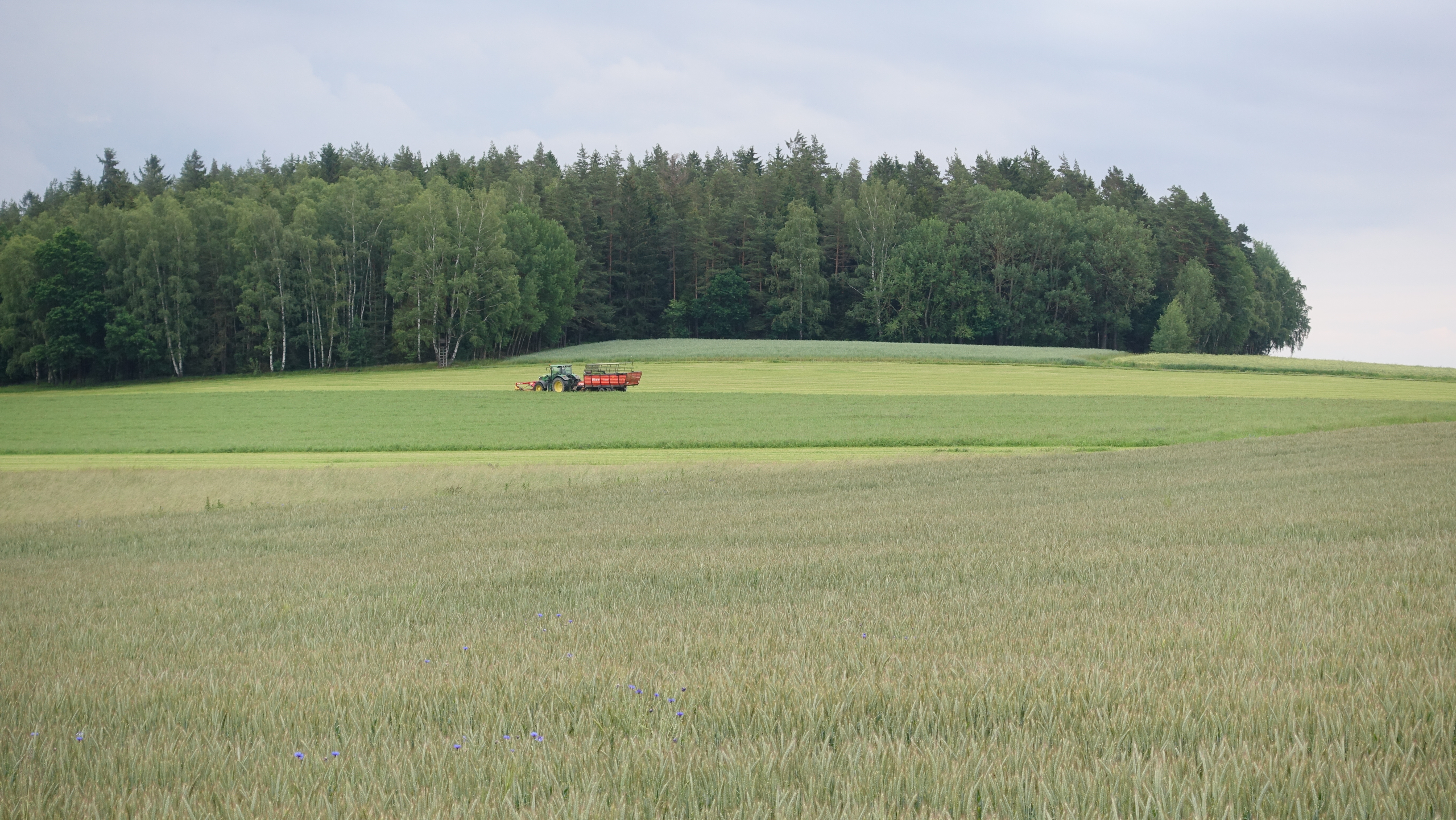 Marktredwitz - Juni 2019 - Oberberg